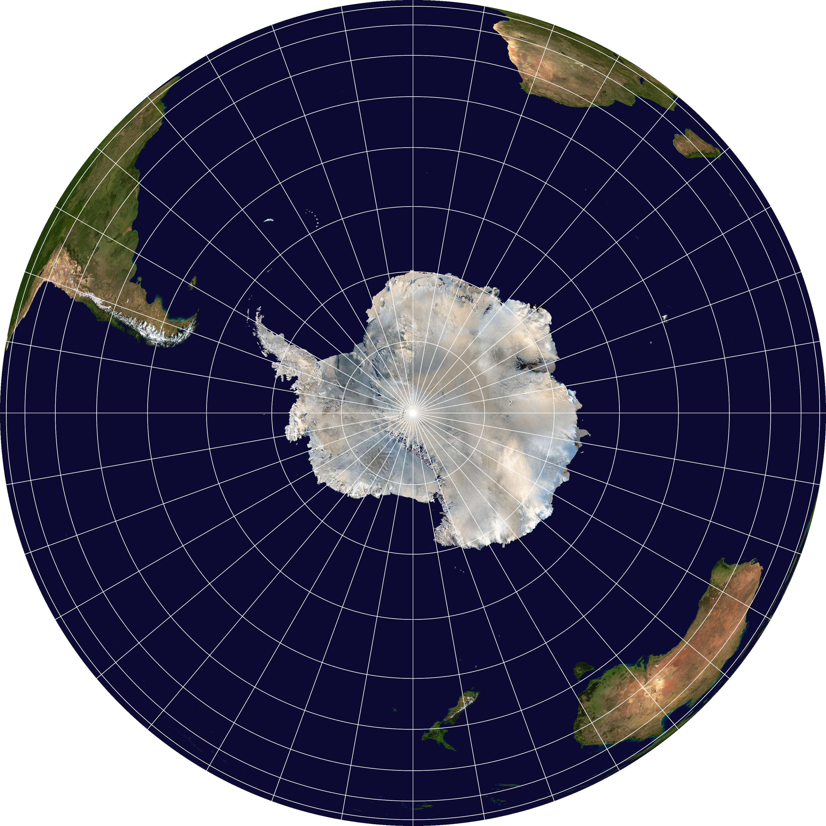 Southern Hemisphere